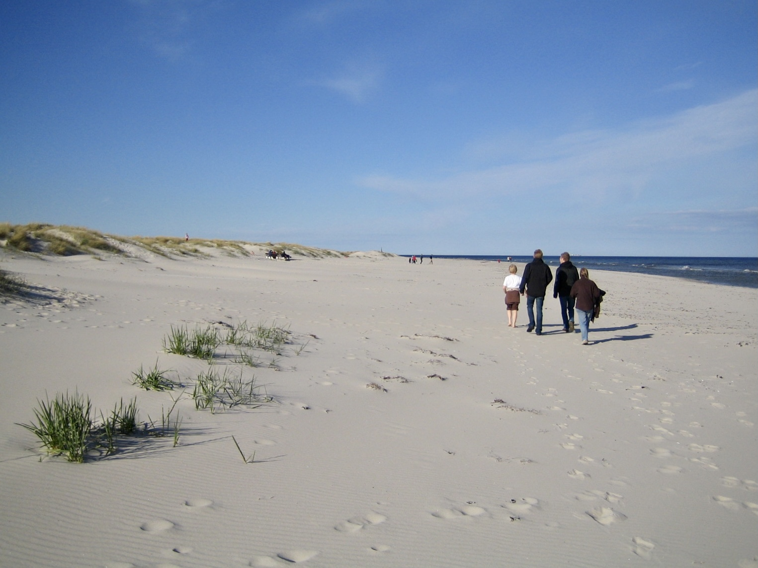 Stranden vid Sandhammaren. Bilden tagen av mig själv 5 maj 2005.